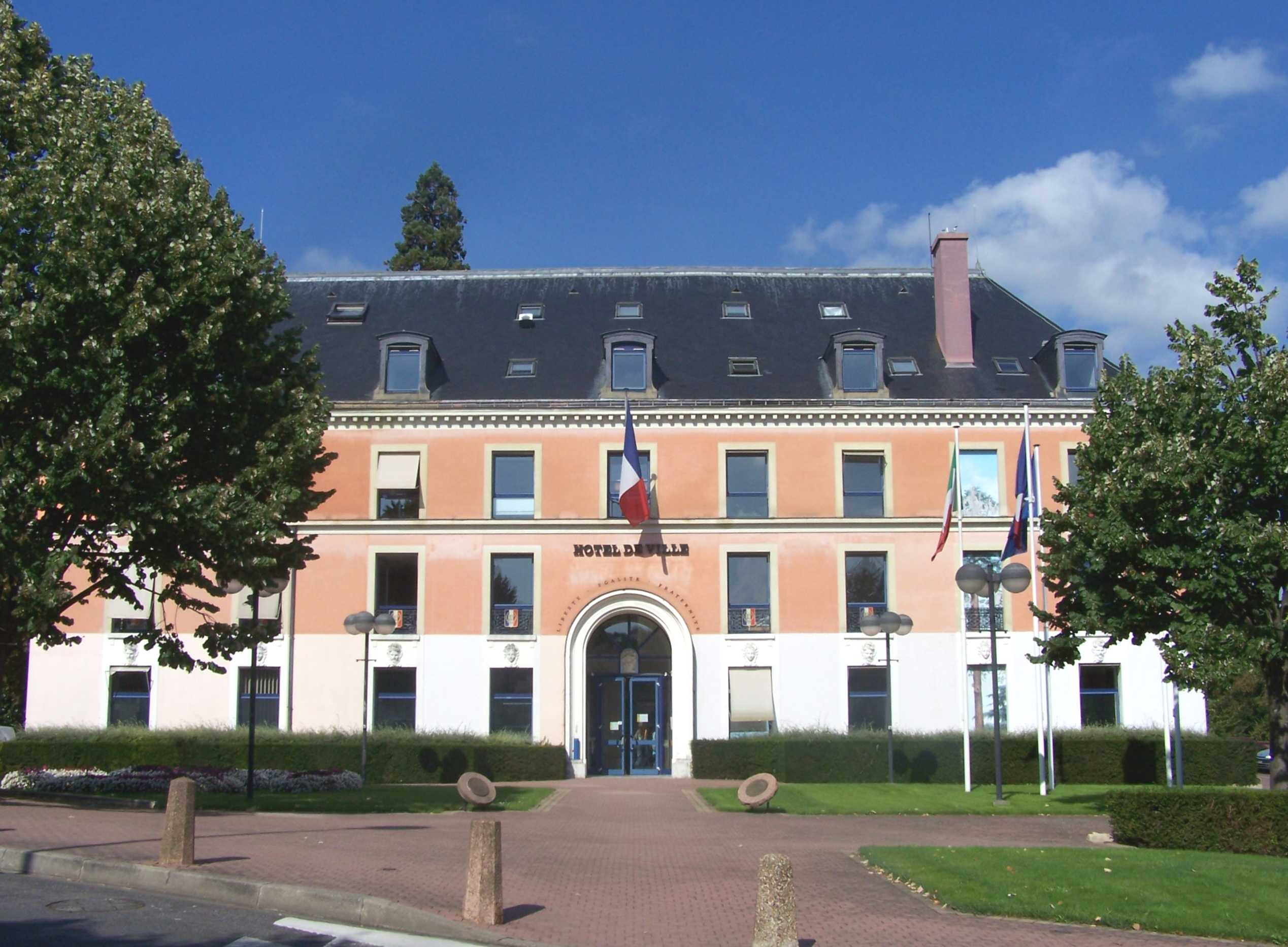 Mairie de Marly-le-Roi (Yvelines, France)